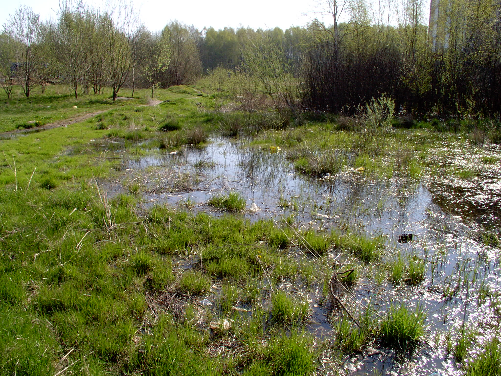 Zbiornik okresowy na Jarotach, Olsztyn